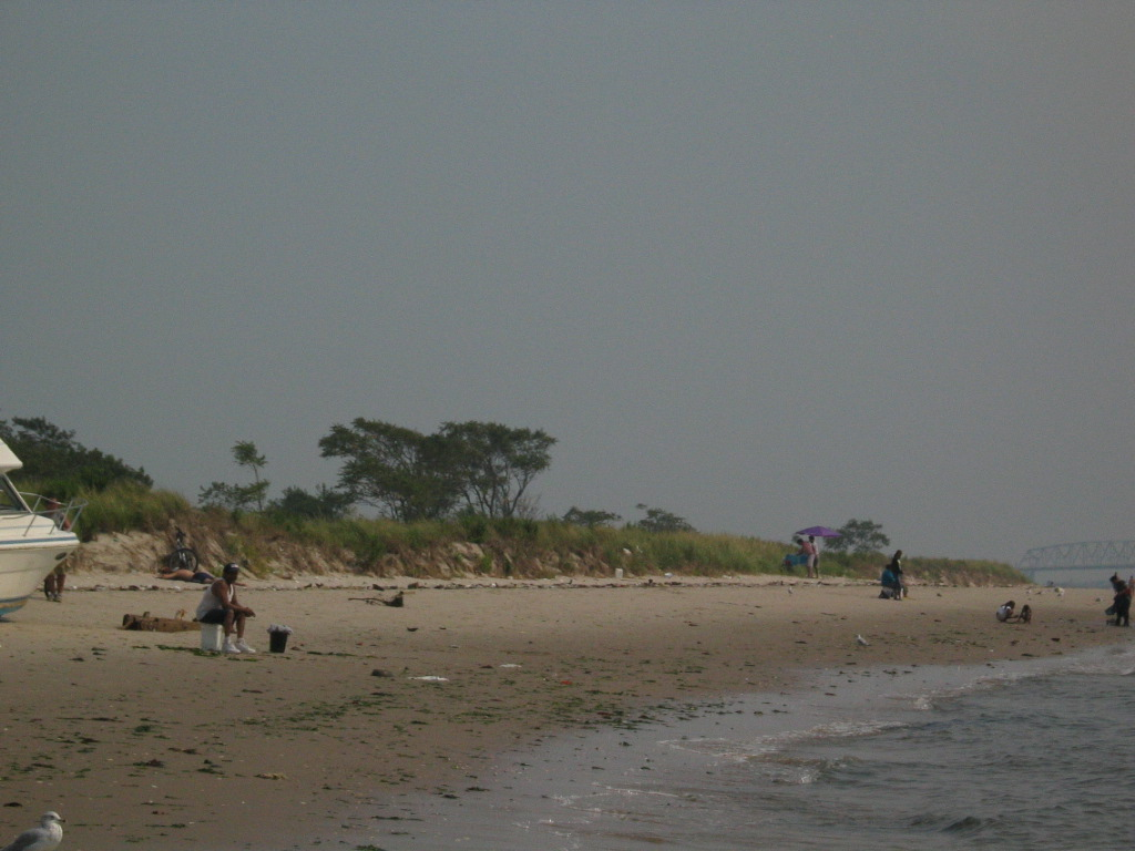 Типичный пейзаж Юго-Восточного Побережья Бруклина